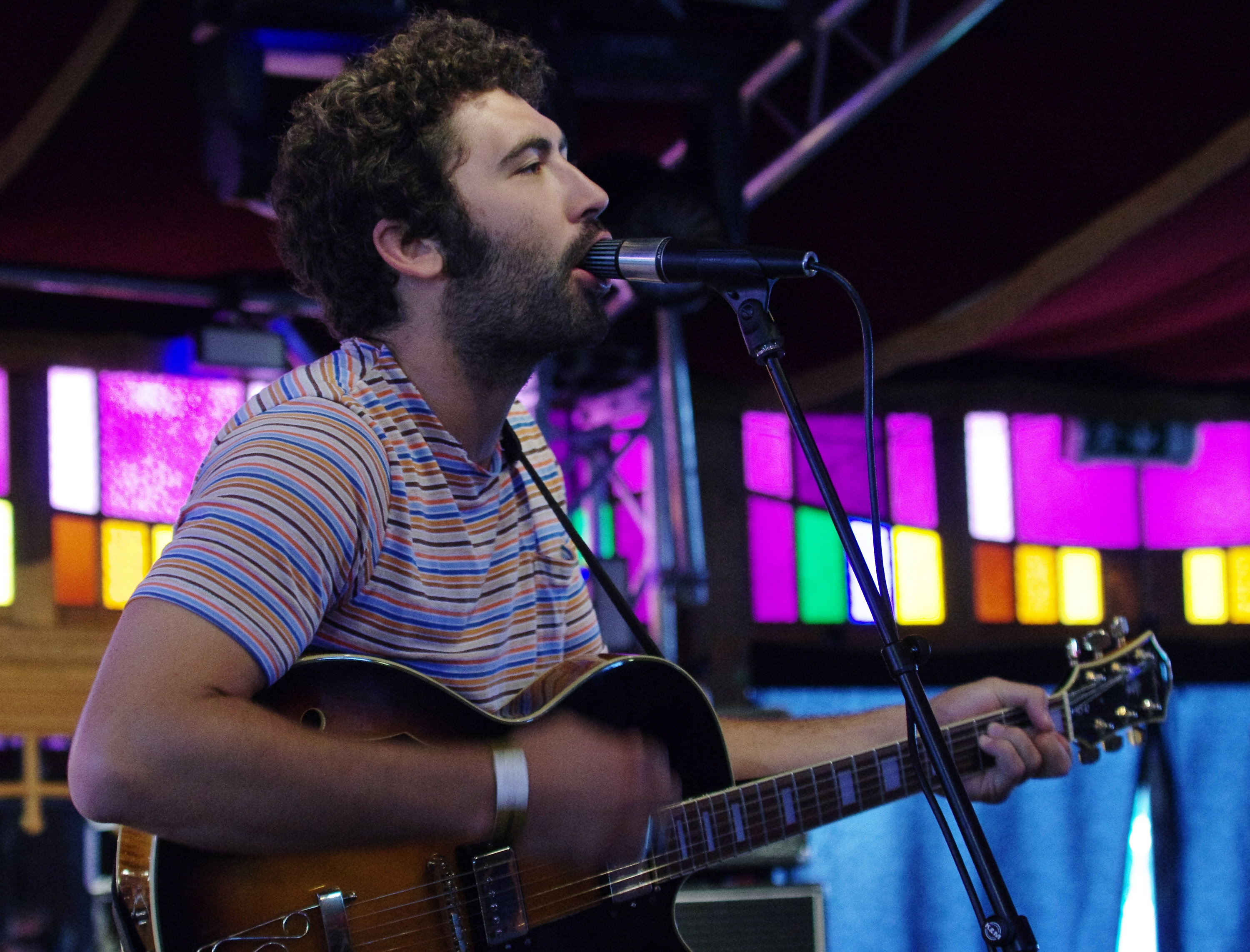 Allah-Las beim Haldern Pop Festival 2013. Besetzung: Matthew Correia (percussion); Spencer Dunham (bass); Miles Michaud (vocals, guitar); Pedrum Siadatian (lead guitar)